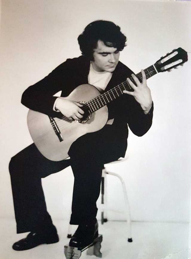 Jan Oberbek w okresie studiow w lodzkiej PWSM